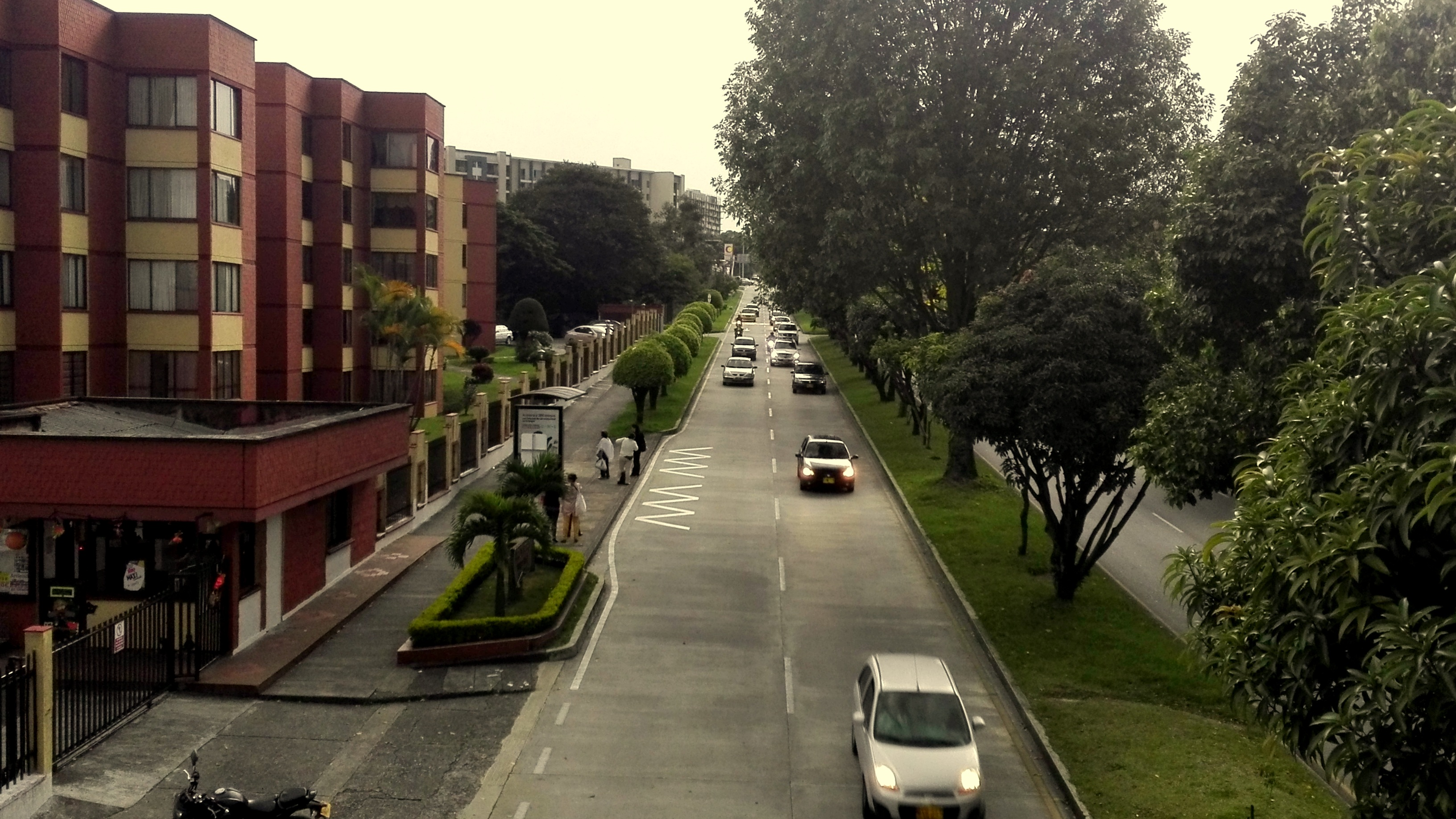 Calzada sentido norte-sur, Avenida 19 de Enero, Armenia, Quindío